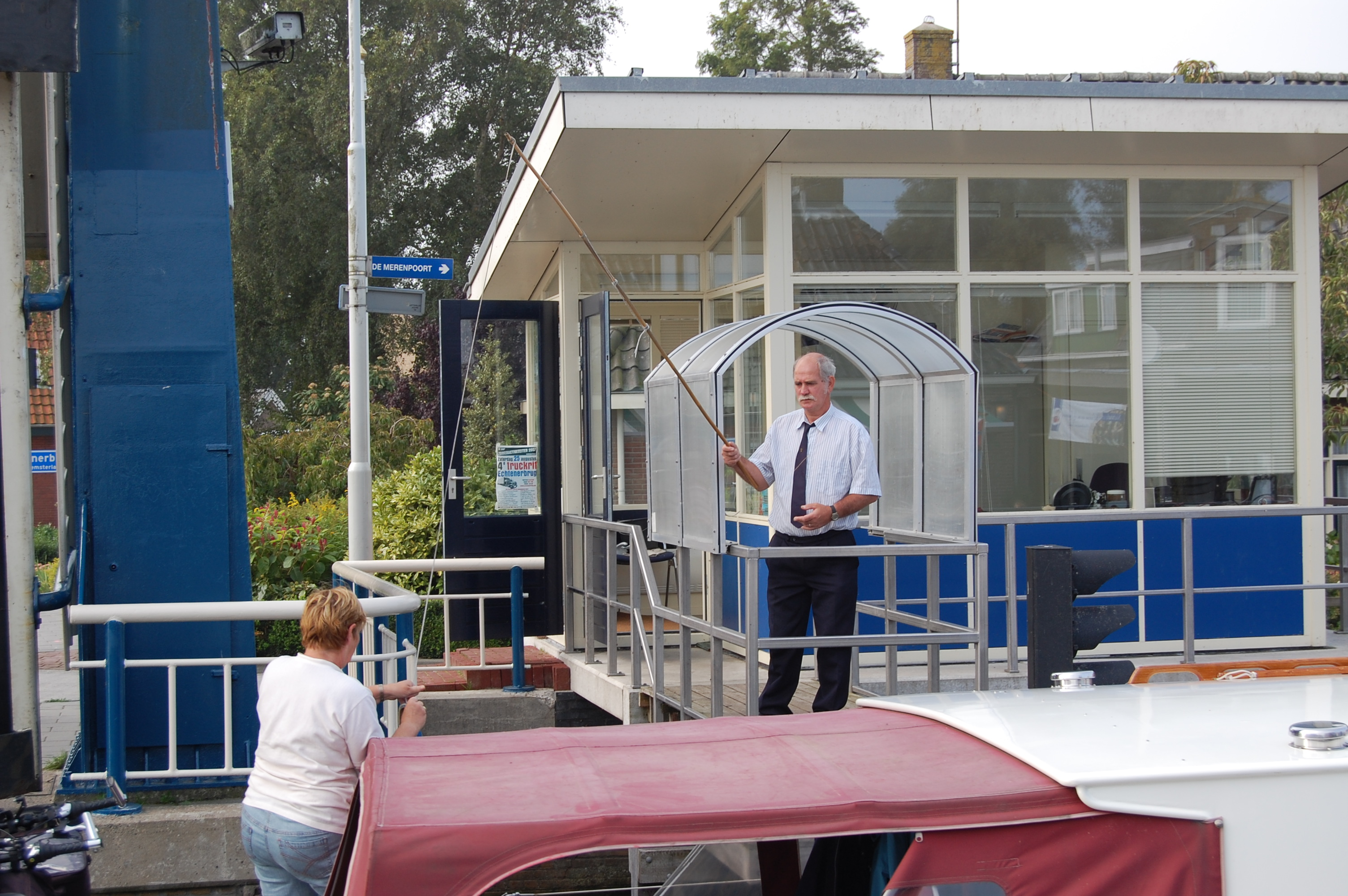 Een brugwachter te Echtenerbrug die doorvaartgeld traditioneel ontvangt